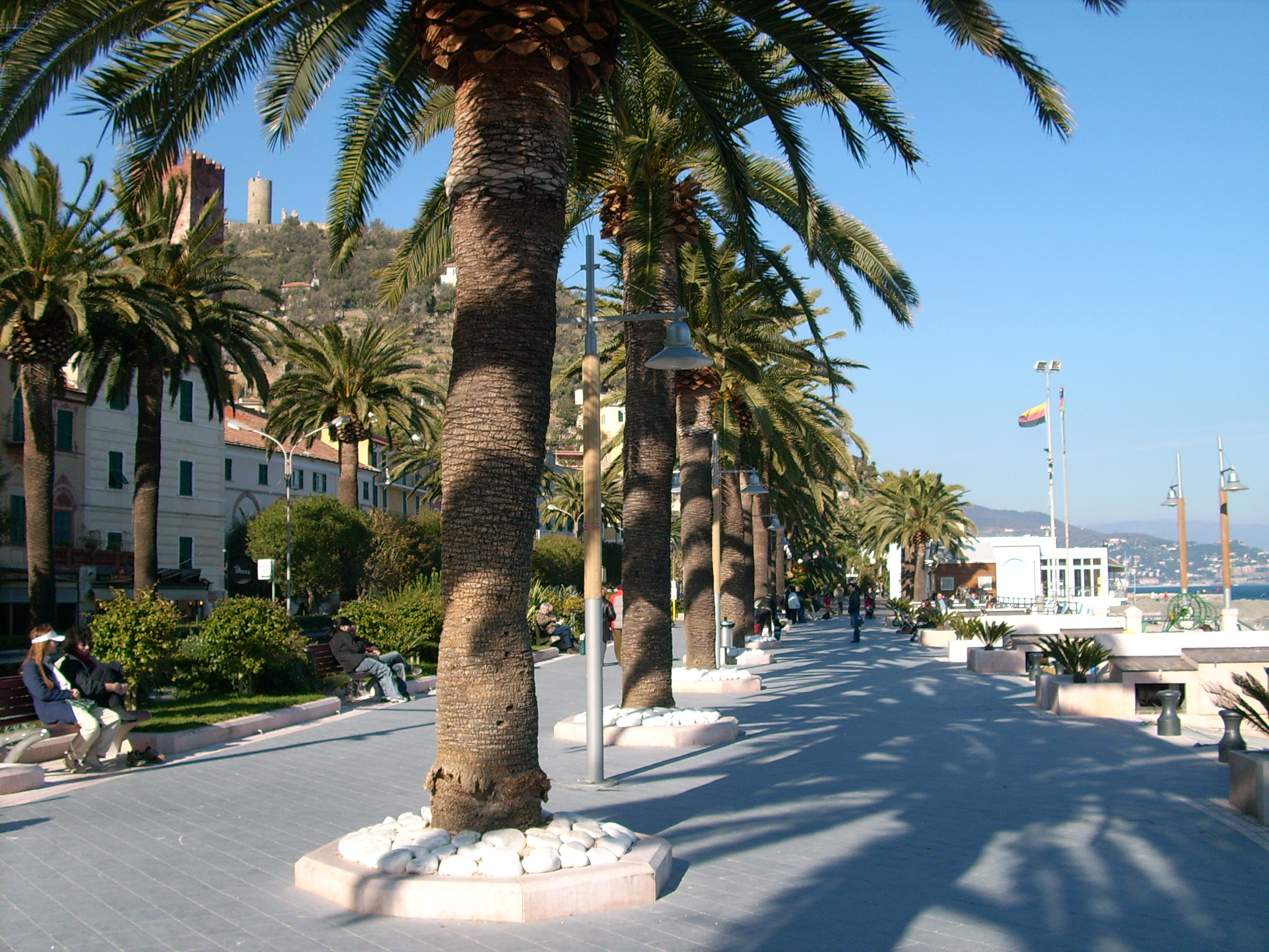 Noli, Liguria, Italy